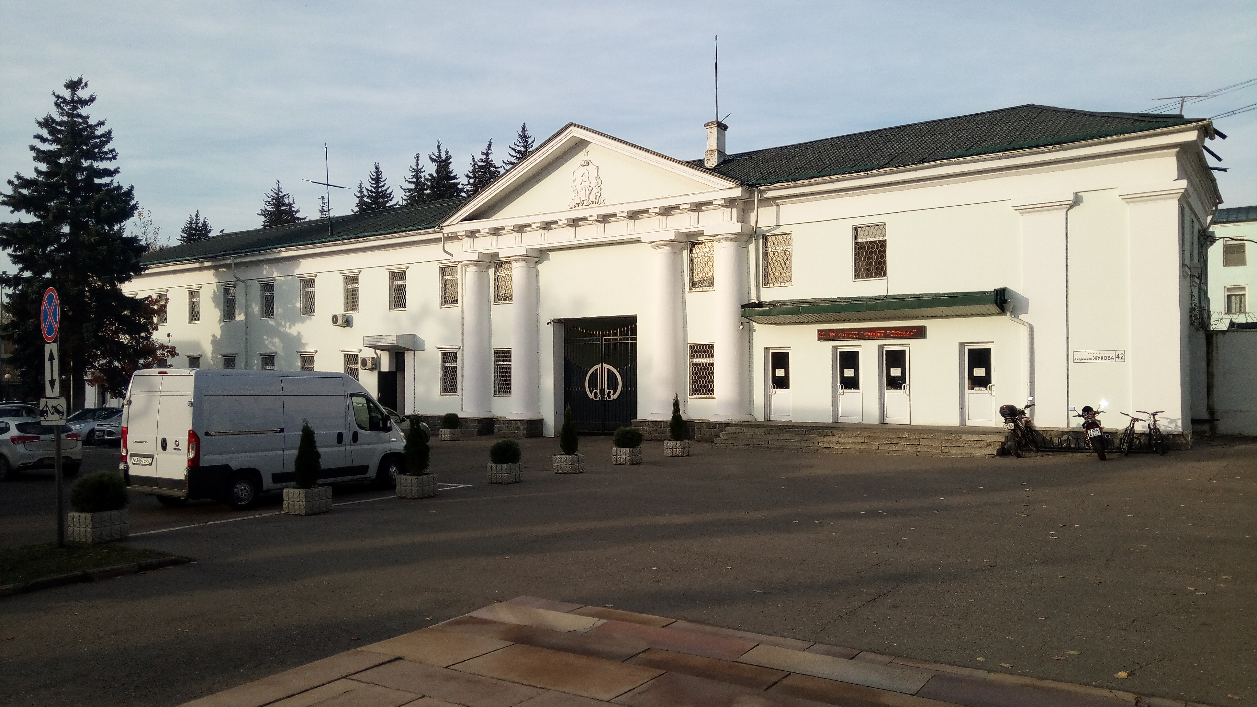 ФЦДТ «Союз» (Дзержинский)